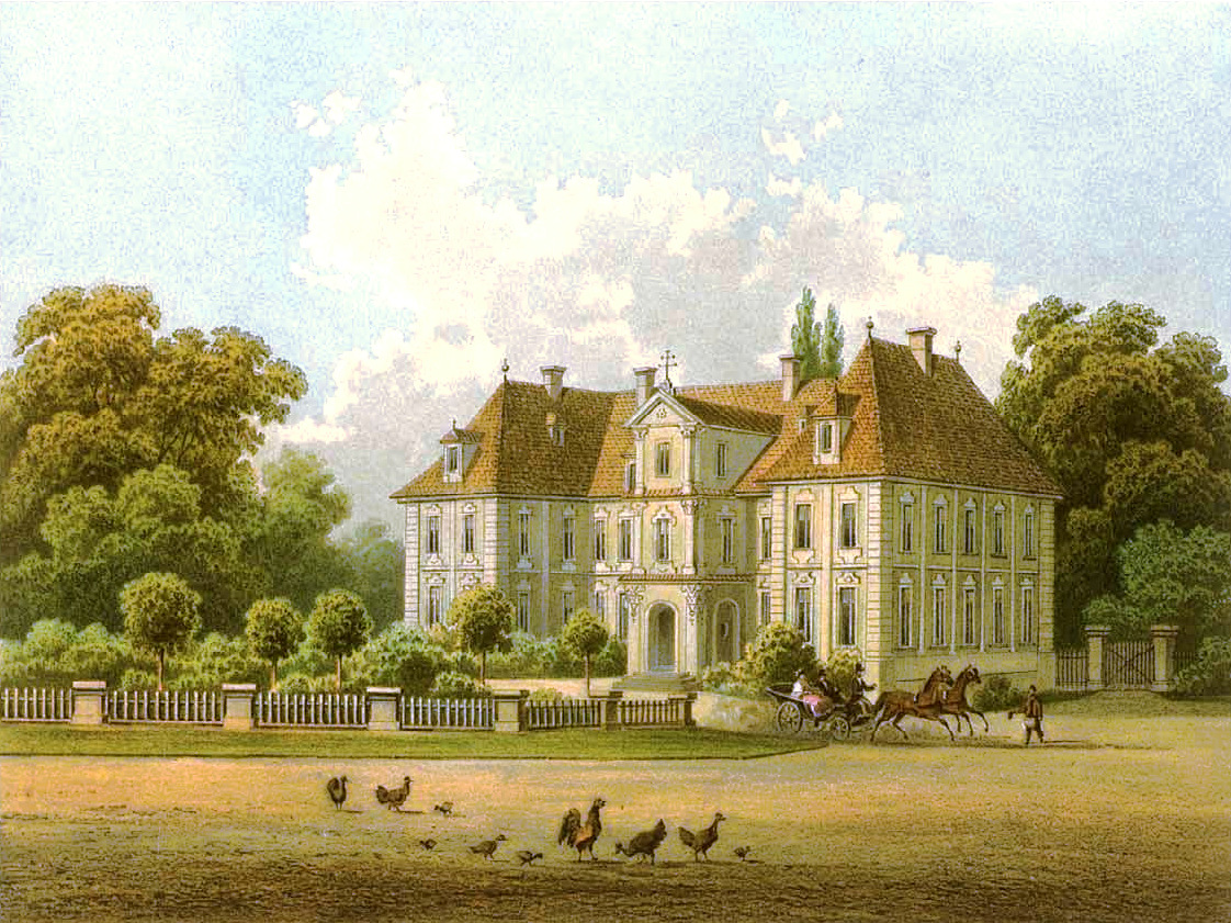 Rittergut Brockau, Kreis Breslau, Provinz Schlesien